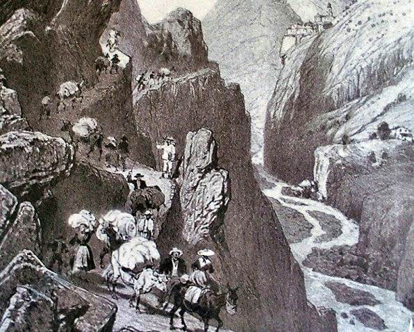 Gravure anonyme partielle des chemins de la route du sel, ici dans la vallée de la Roya.